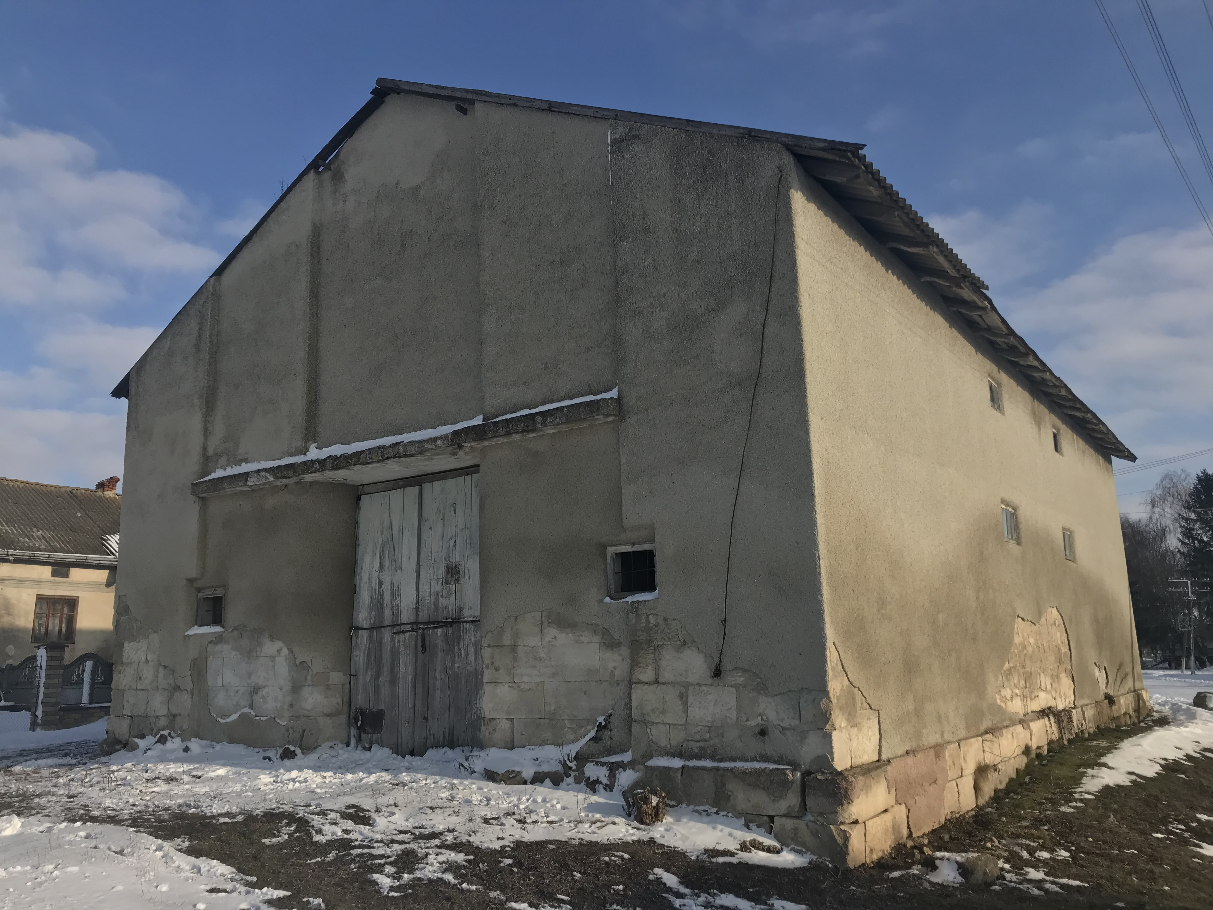 Будівля бувшого римо-католицького костелу, с. Вівся Козівського району Тернопільської області. В радянські часи служила за склад продовольчих товарів.